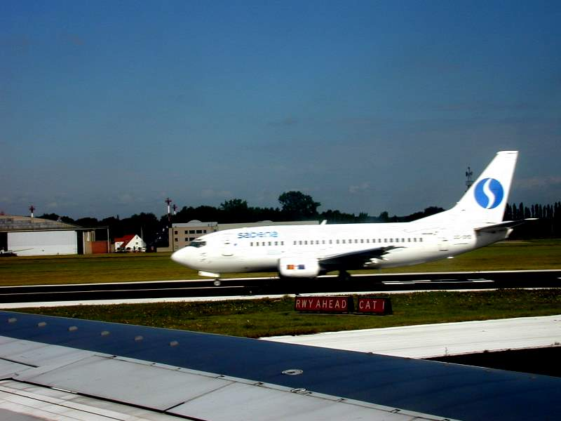 Sabena Boeing 737-500